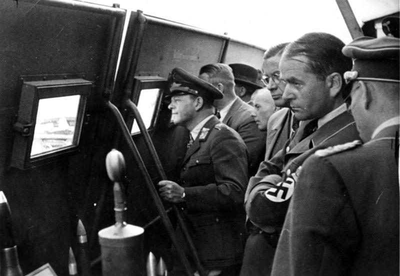 Zentralbild II. Weltkrieg 1939-45 Arbeitstagung der führenden Männer der deutschen Rüstung im Oktober 1943, die der Reichsminister für Rüstung und Kriegsproduktion Prof. Albert Speer einberufen hat. Auf einem Flugplatz im Osten beobachten die Teilnehmer hinter Deckungsschutz die Vorführung eines neuentwickelten Kampfmittels. Links Generalfeldmarschall Erhard Milch, rechts Reichsminister Speer.